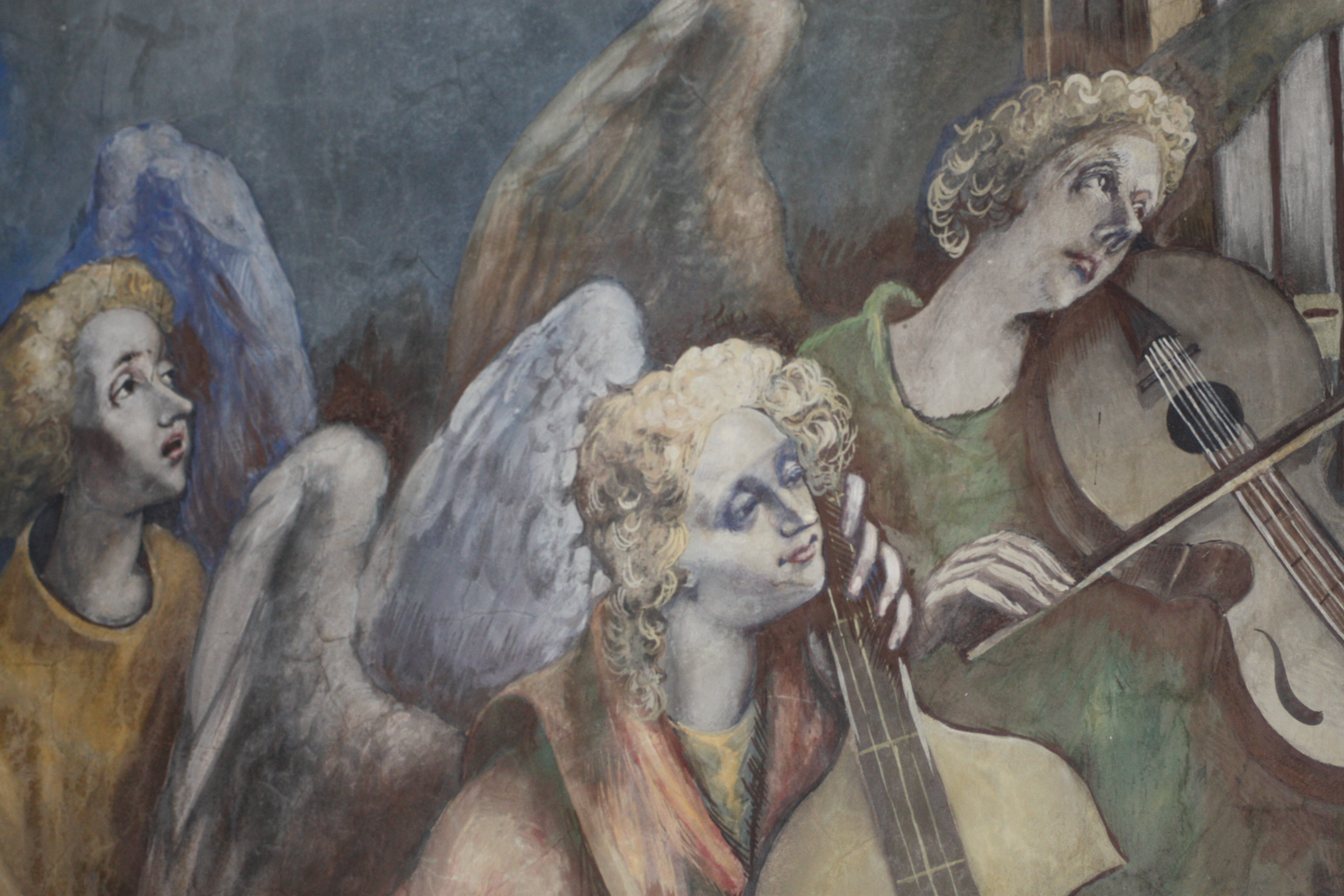 Muurschildering Odulphuskerk, Bakhuizen